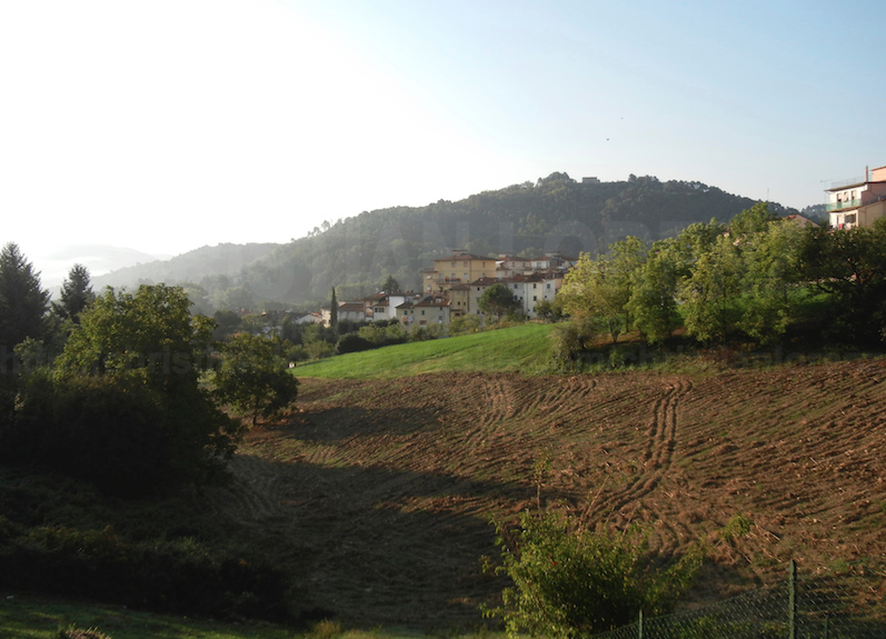 Viale dei Macelli a Vicchio.